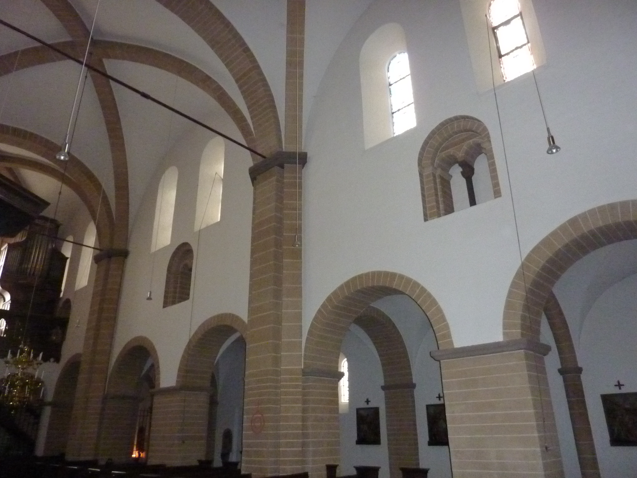 St. Clemens (Wissel)